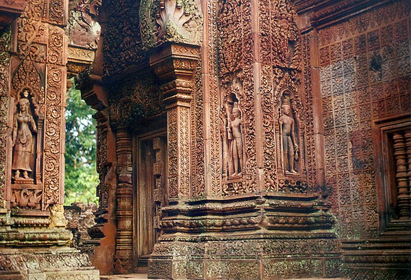 Fonte